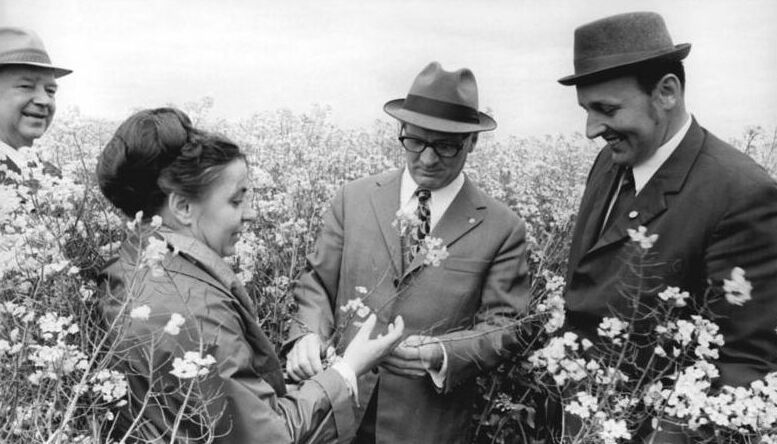 ADN-ZB / Koard / pa / 1.6.72 Bez. Neubrandenburg: Honecker in Dedelow Der Erste Sekretär des ZK der SED, Erich Honecker (Mitte), besuchte am 1.6.72 die Kooperation Dedelow, Kreis Prenzlau. Bei der Feldbegehung - auf unserem Foto ein Rapsschlag - wurde er von Gerhard Grüneberg (l.), Mitglied des Politbüros und Sekretär des ZK der SED, von Margarete Müller (2.v.l.), Kandidatin des Politbüros und Mitglied des Staatsrates, und Friedrich Clermont (r.), Mitglied des Staatsrates der DDR und Leiter der kooperativen Pflanzenproduktion in Dedelow, begleitet. (siehe ADN-Meld.)